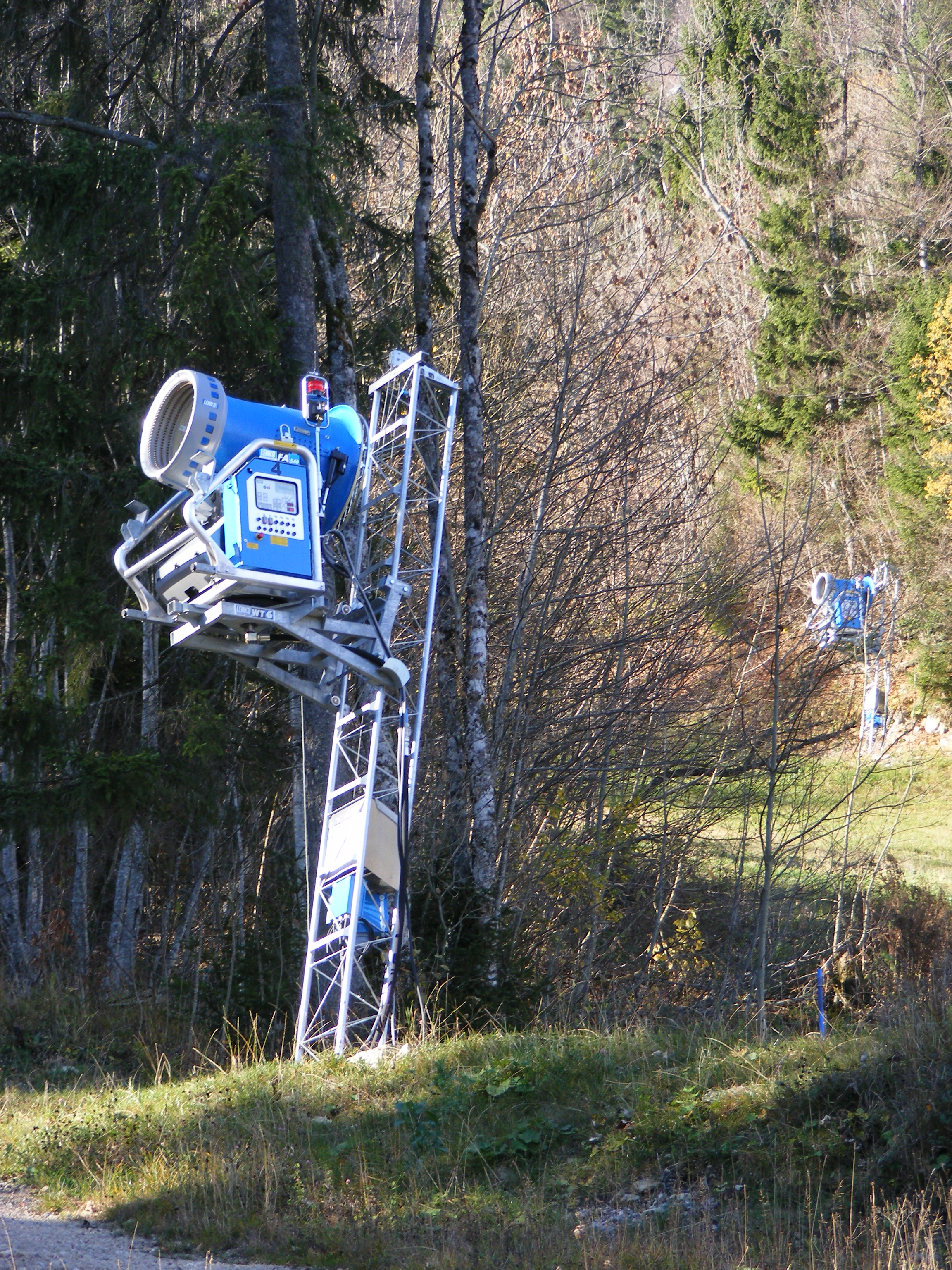 Schneekanonen des Typs FA 540 (Hersteller: Lenko) auf Berg Brauneck in Bayern außerhalb der Saison